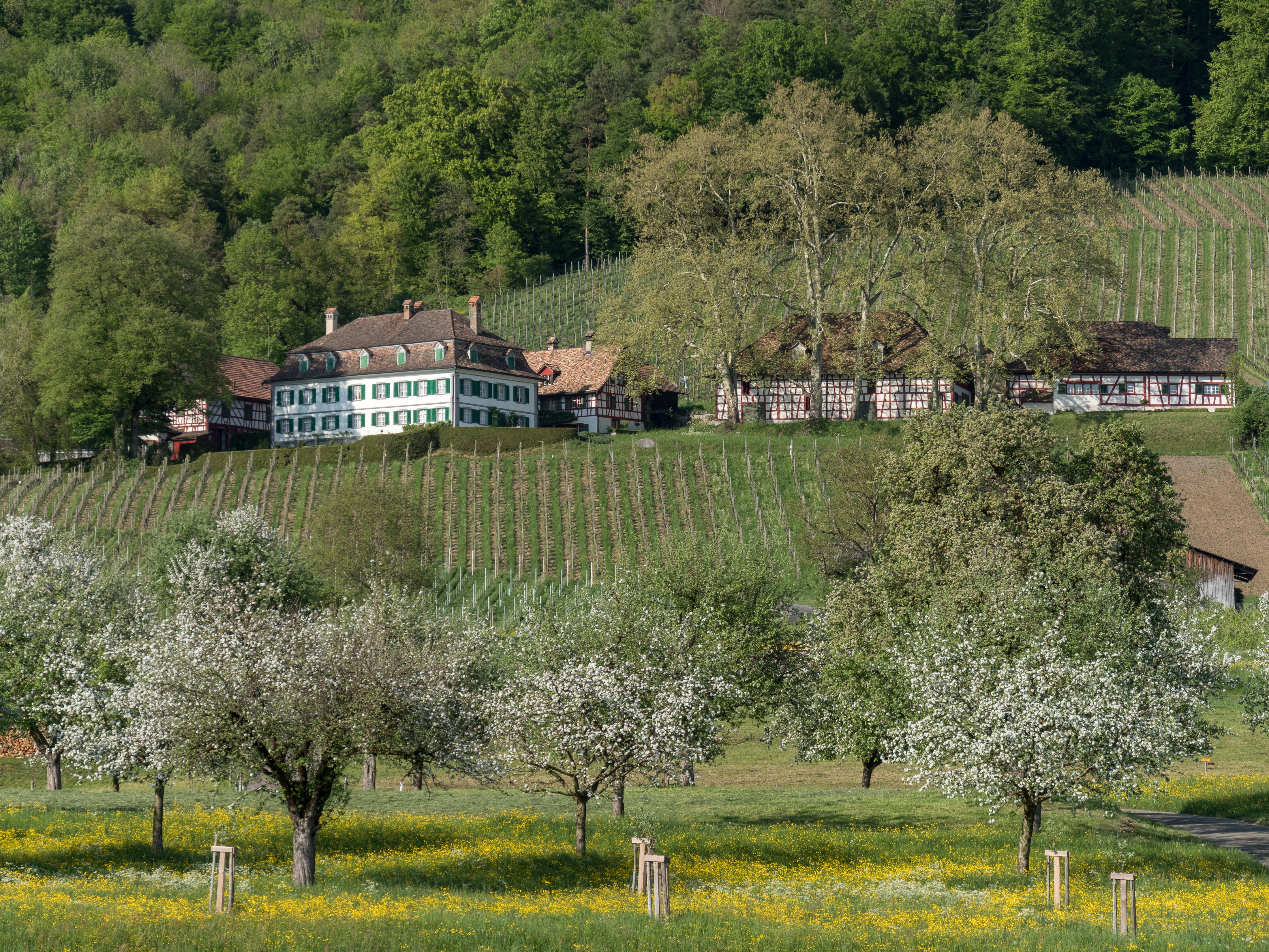 Schloss Bachtobel in Weinfelden im Frühling 2018